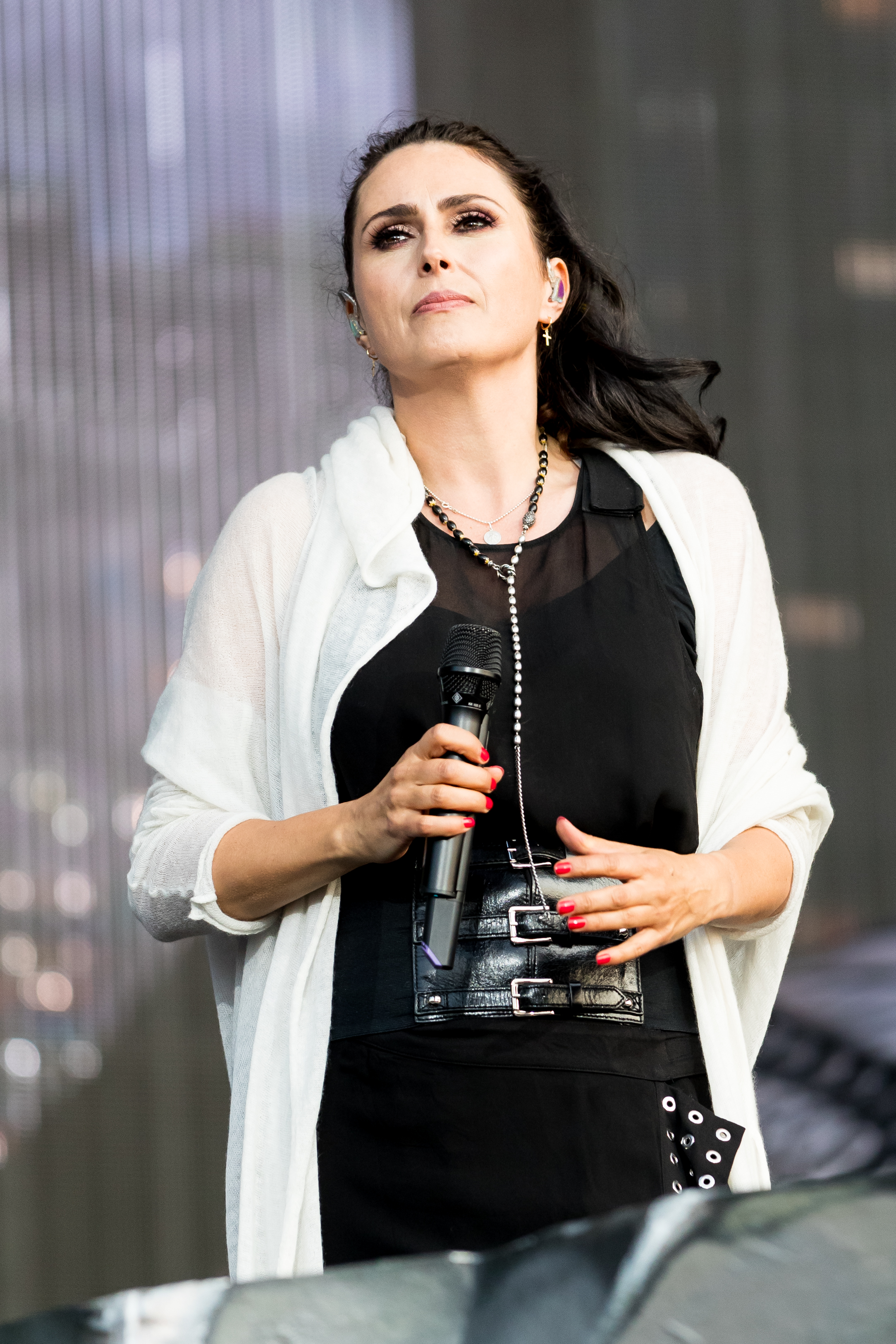 Within Temptation during Wacken Open Air at The Holy Wacken Land, Wacken, Schleswig-Holstein, Germany on 2019-08-02, Photo: Sven Mandel